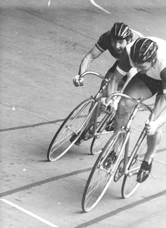 Jürgen Geschke, Peter Eichstadt ADN-ZB Gahlbeck 7.7.74 Leikpzig: DDR-Meisterschaften im Bahnradsport - Im Sprint konnte sich Jürgen Geschke (links) vor seinem Klubkameraden Peter Eichstadt (biede TSC Berlin; rechts) den Meistertitel erkämpfen.